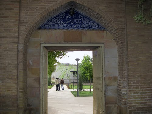 آرامگاه